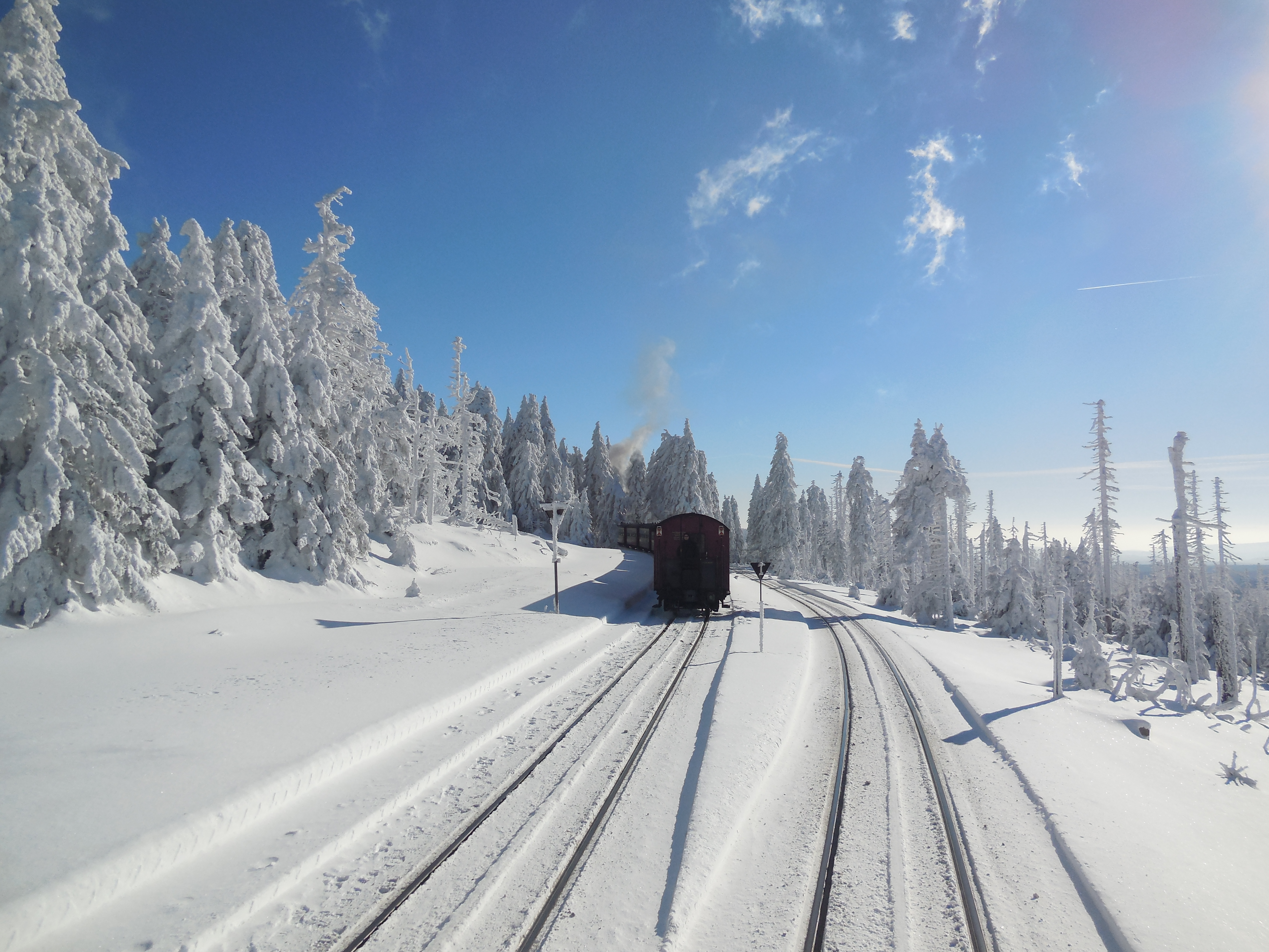 Ein Zug der Harzer Schmalspurbahnen auf dem Stumpfgleis des ehemaligen Bahnhofs Goetheweg, kurz nach einer Zugkreuzung